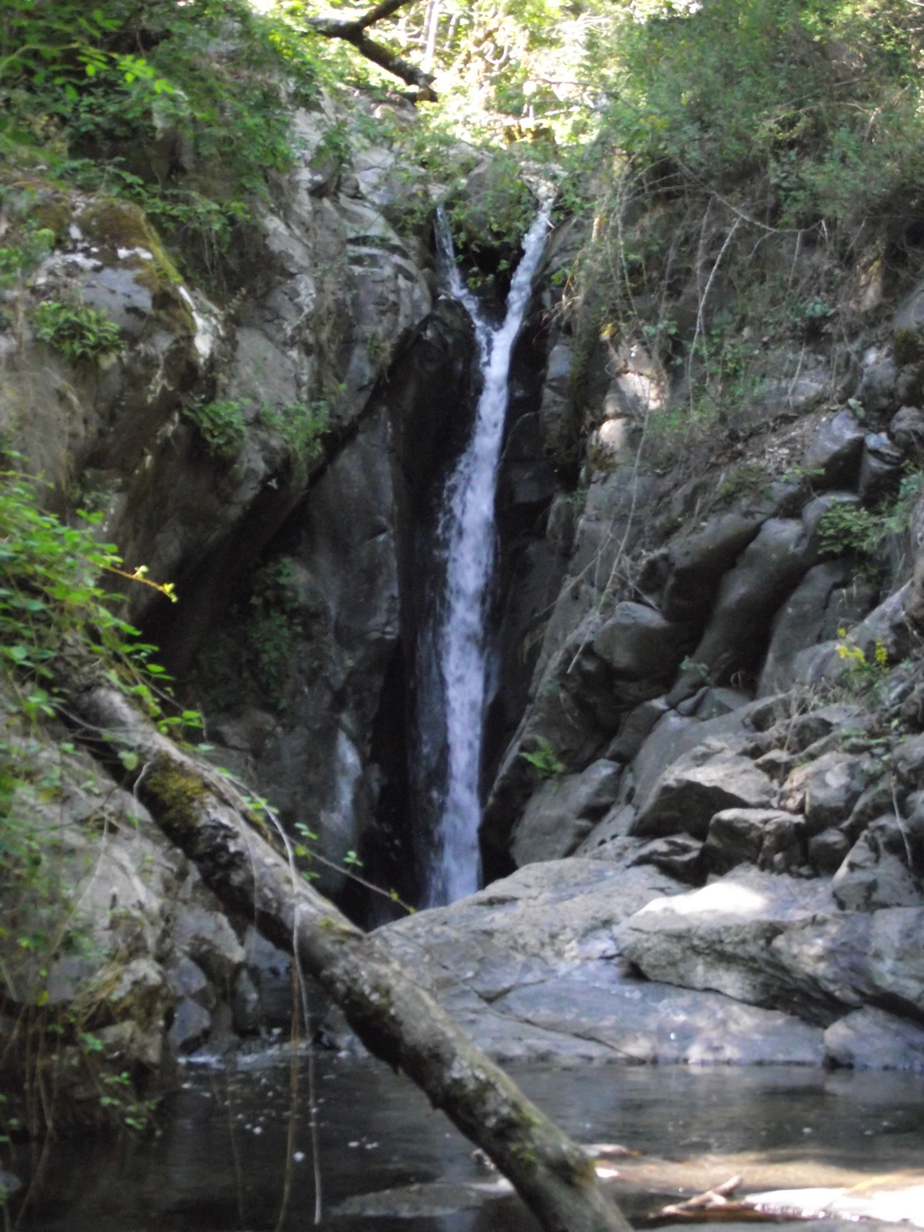 Cascade du Régourdel, non loin de Marvejols (Lozère). Vue de la cascade aval.